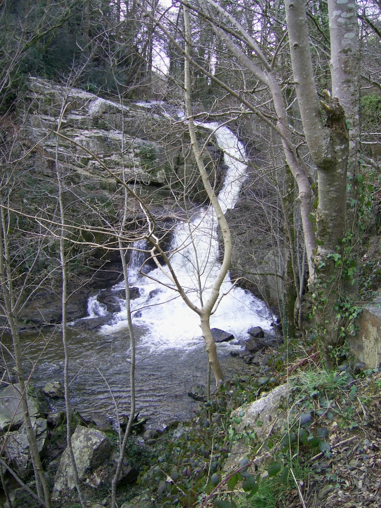 Grande cascade de Mortain, La Manche, Normandie, France